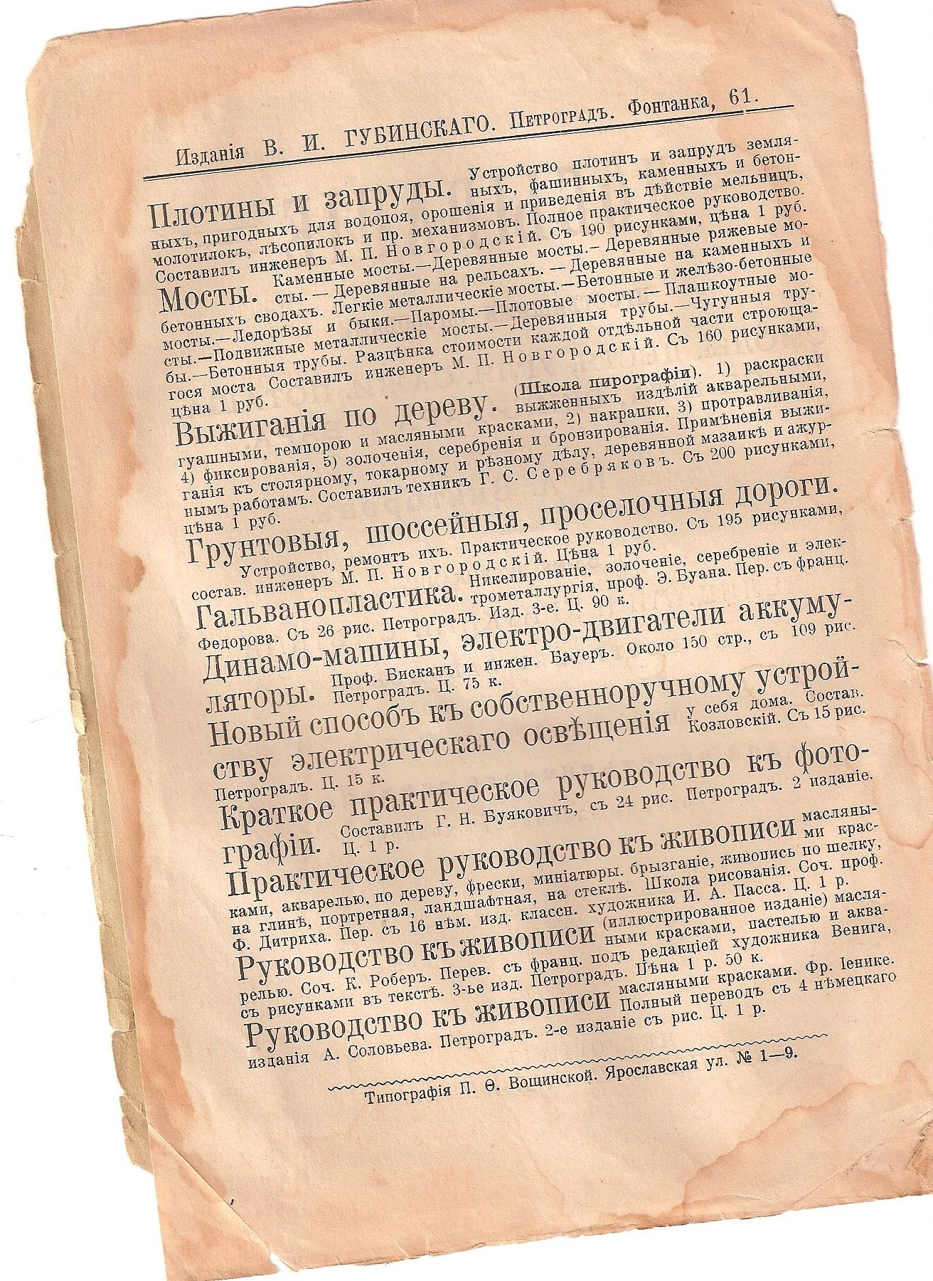 Журналъ «Общедоступное руководство для крестьянскаго обихода и лѣсопромышленниковъ-хозяев», 1915 годъ, изданiе В.И. Губинскаго (Петроградъ, Фонтанка, 61), Типография П.Ѳ. Вощинской. Ярославская ул. № 1-9 (Добыванiе простѣйшими способами смолы, дегтя, угля, сажи, поташа, спирта, скипидара и вара съ 63-мя рисунками, таблицами и краткими смѣтами на постройку заводовъ. Составилъ П.А. Викторовъ